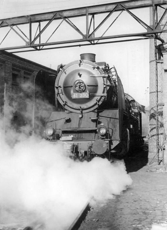 Dampflok 41 230 (BR 41) Zentralbild Quasch. 28 Mot. 10.3.1954 Aus der Arbeit des VEB Lokomotivbau Babelsberg. UBz: Eine Lokomotive der Baureihe 1941 auf Probefahrt.